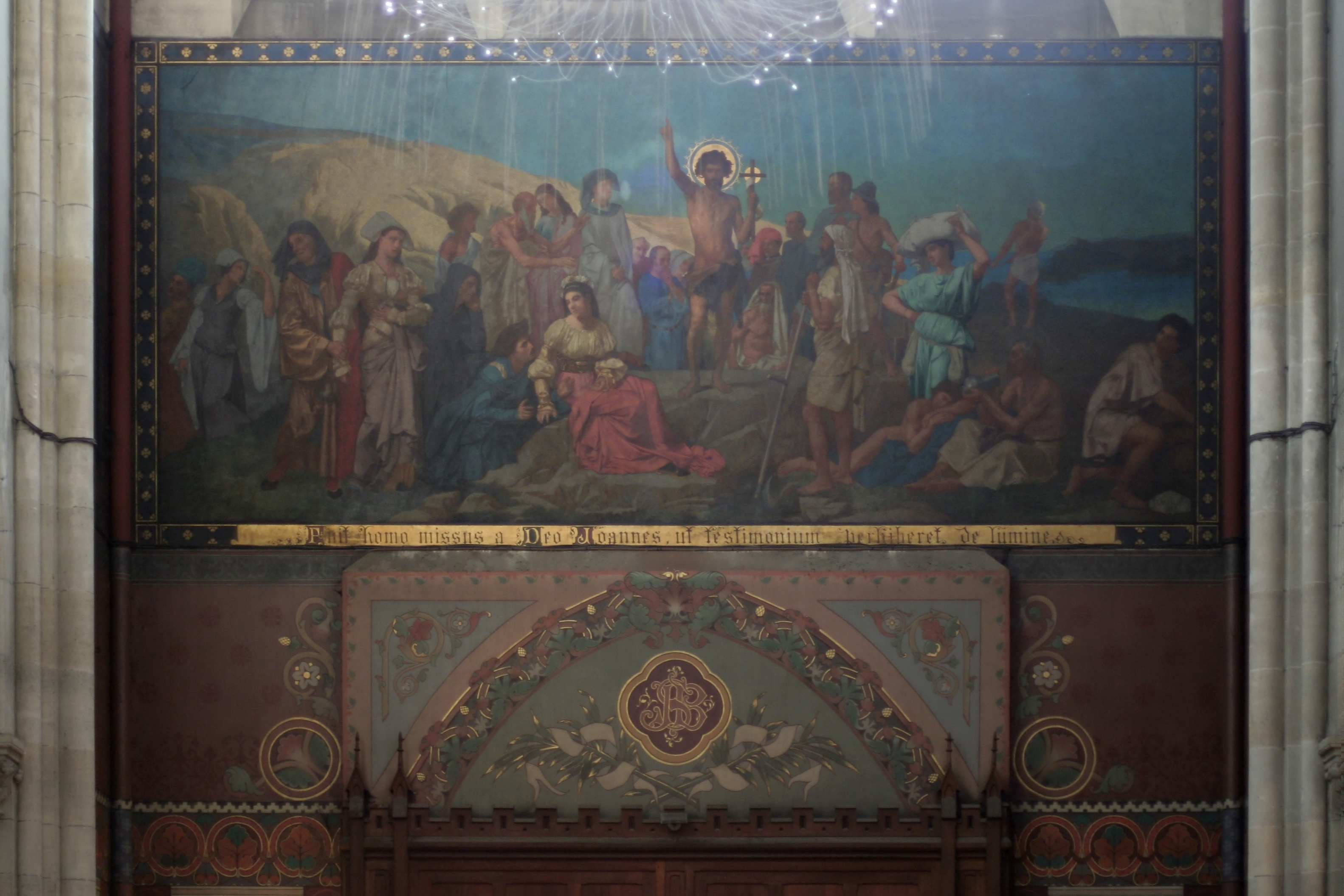 Église Saint-Jean-Baptiste de Belleville, Paris 19e arrondissement. Peinture du transept : La prédication de Jean par Théodore Maillot.Inscription : « Fuit homo missus a Deo Joannes ut testimonium perhiberet de lumine »